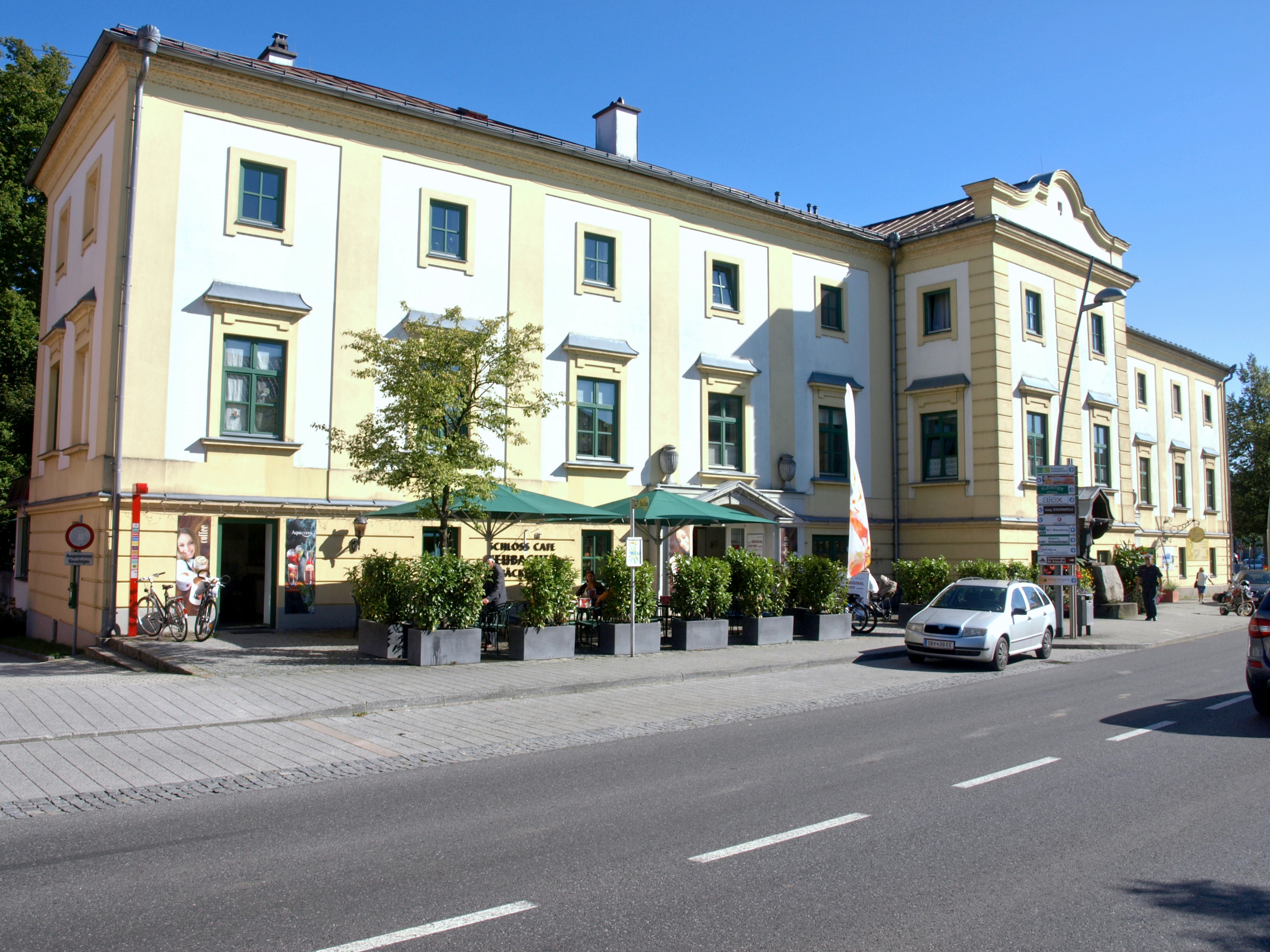 Ehem. Marktschloss